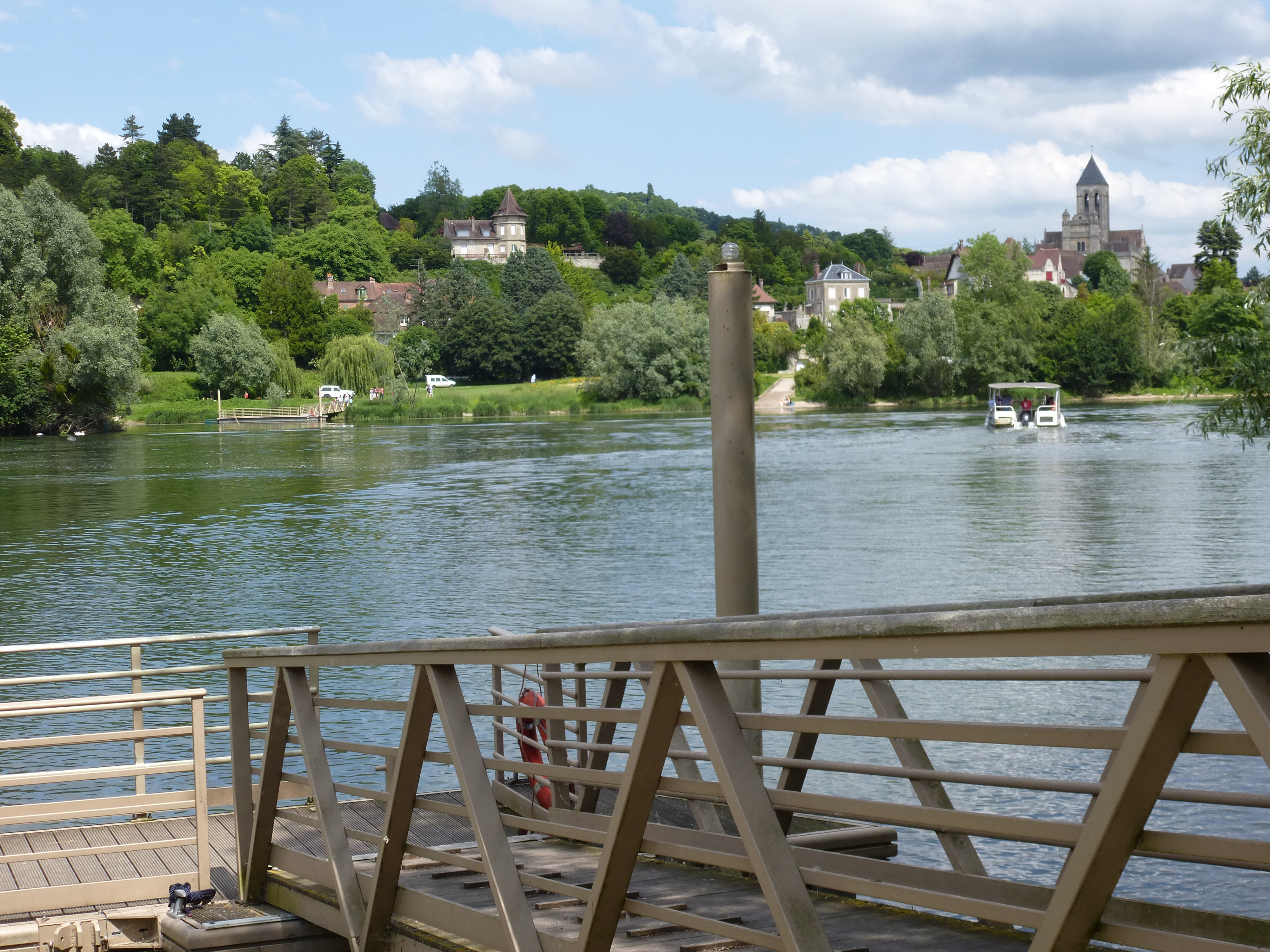 Rumantsch: Bac permettant de traverser la Seine de Lavancourt à Vétheuil. commune de Moisson, département des Yvelines, région Île-de-France).